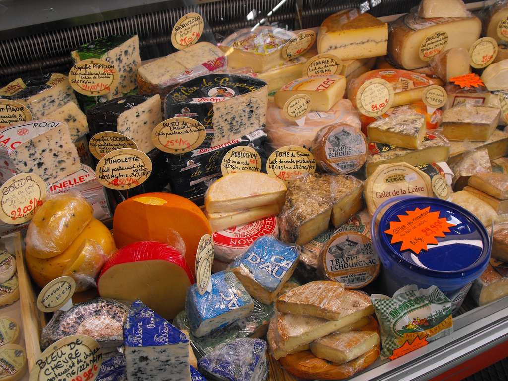 Variedad de quesos franceses.